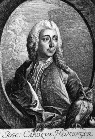 Portrait von Johann Karl Hedlinger.